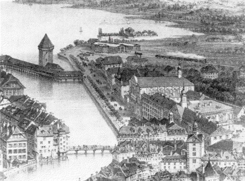 Weitab der Stadt verlässt ein Zug den ersten Luzerner Bahnhof und durchquert das Gebiet des heutigen Hirschmattquartiers.